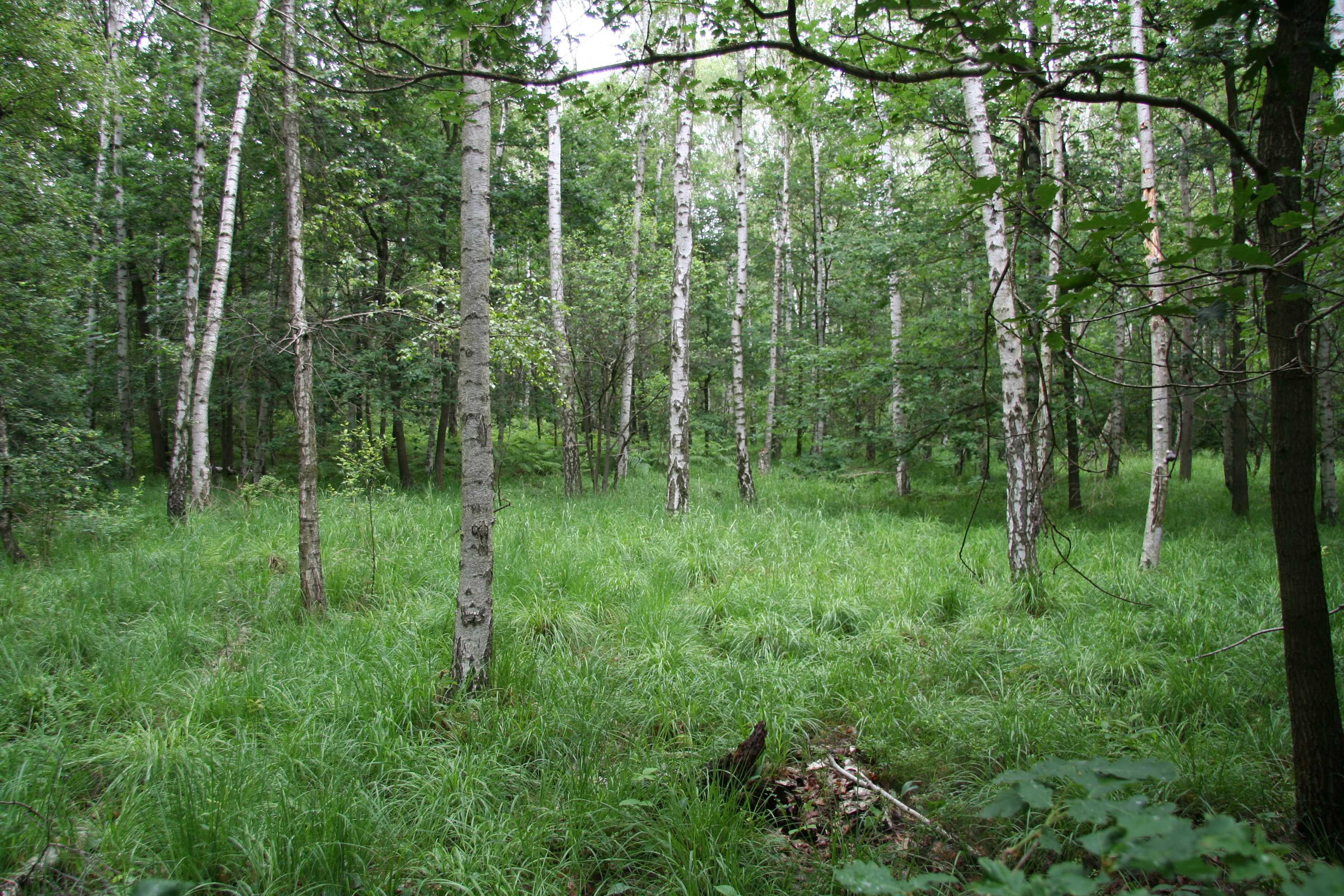 im FFH-Gebiet 4641-302 Laubwaldgebiete zwischen Brandis und Grimma